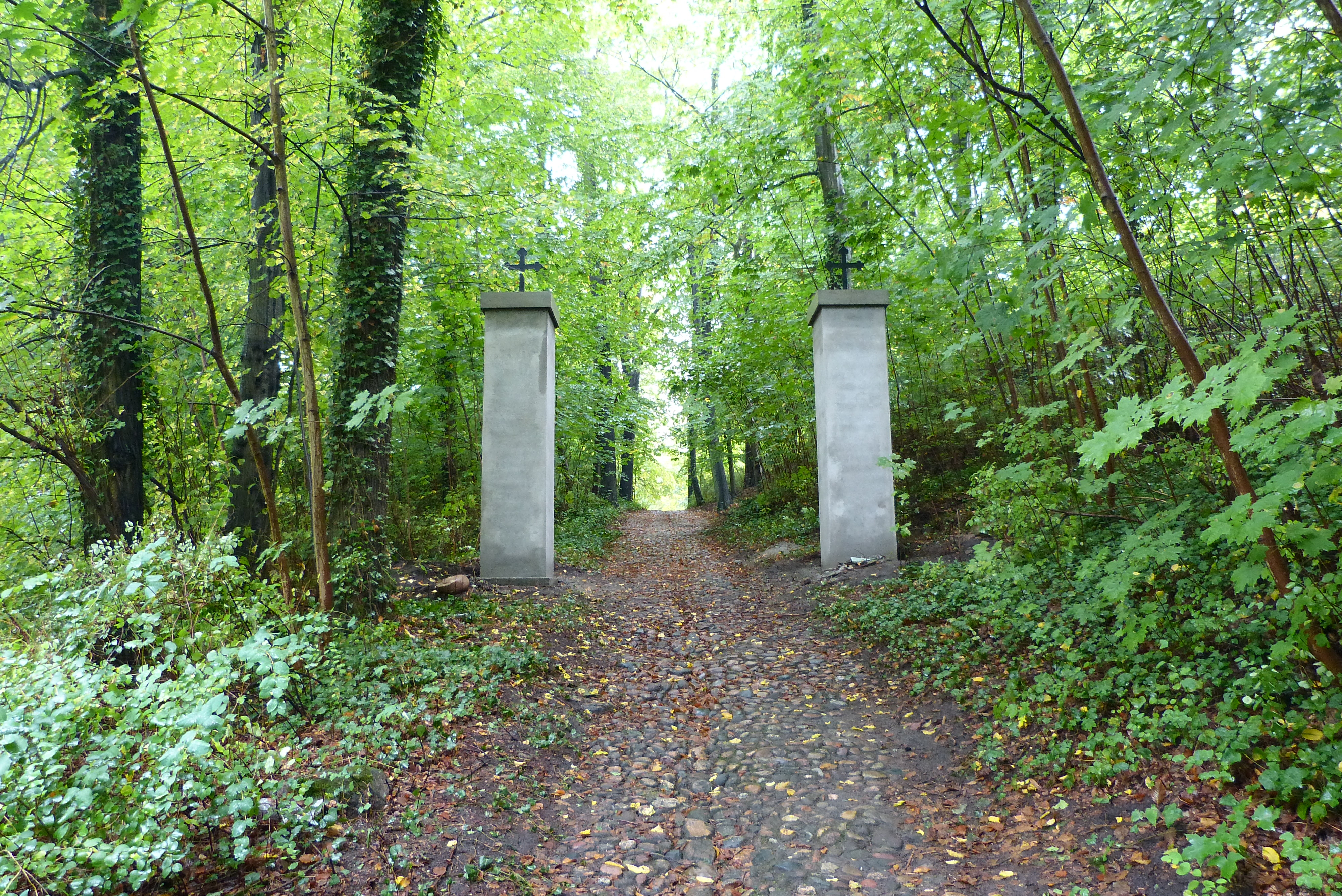 Eingangsportal Georgenberg Friedhof im „Rohbau“ fertiggestellt.